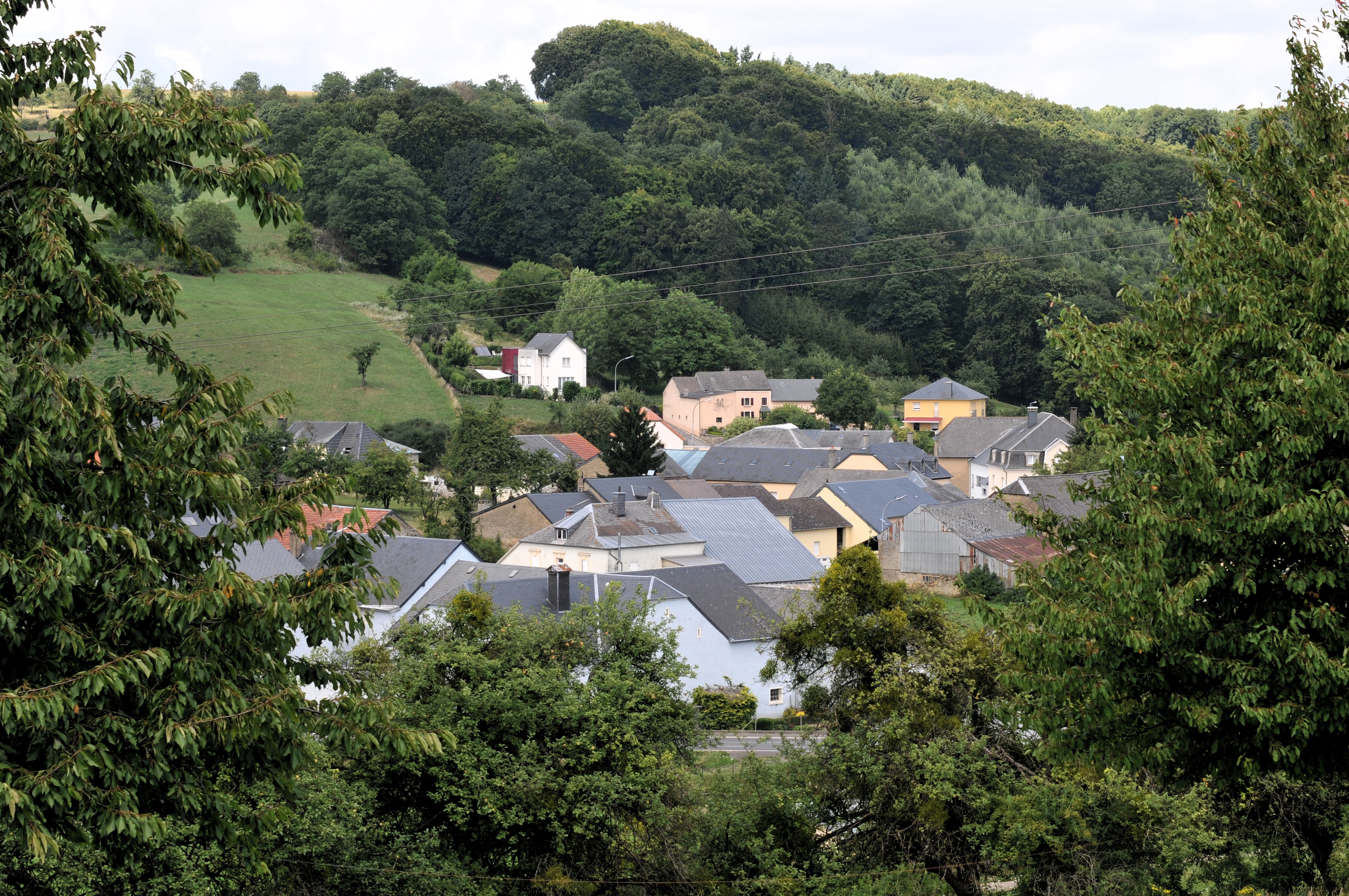 Ierseng vum Stiewesbierg aus gesinn.